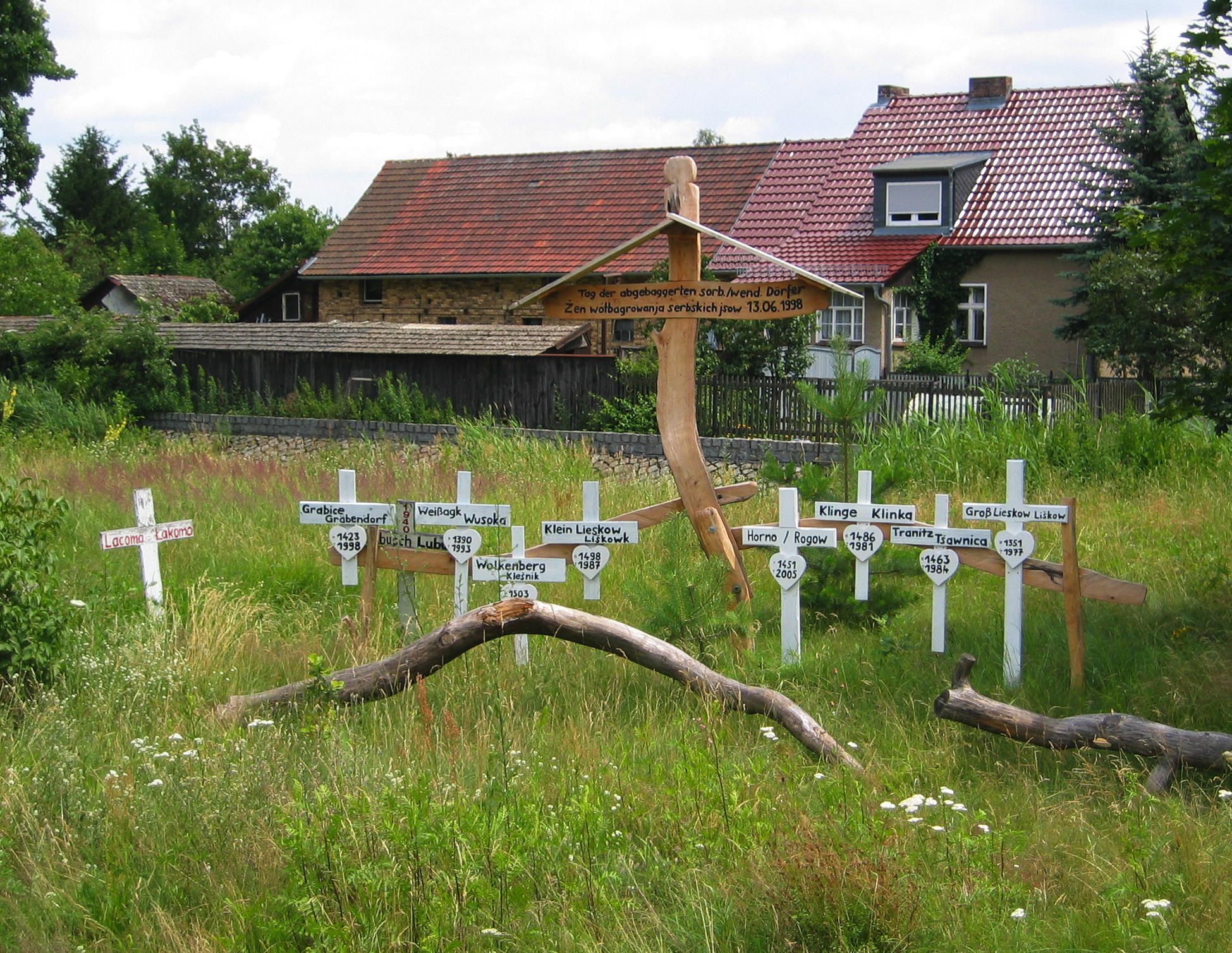 Holzkreuze an der Bundesstraße am Ortseingang von Lakoma, Cottbus, Deutschland. – Die Kreuze erinnern an Lausitz-Dörfer, die den Braunkohletagebauen zum Opfer fielen („Tag der abgebaggerten sorbischen/wendischen Dörfer“; 13.06.1998).